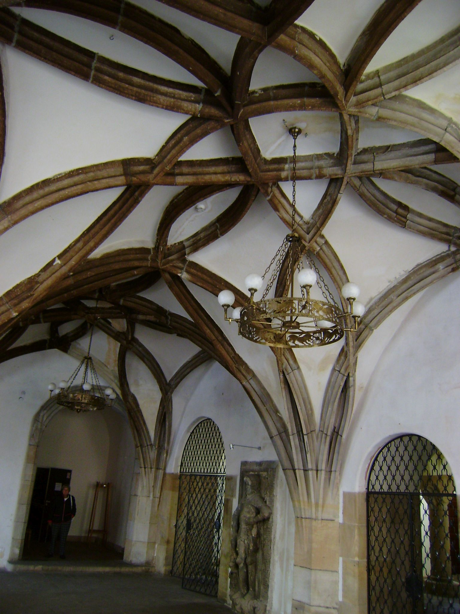 Spätgotische Netzgewölbe von 1522 im Erdgeschoss vom Rathaus Löwenberg in Schlesien